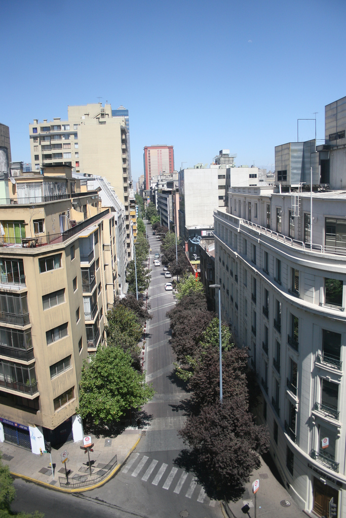 Calle Huérfanos, Santiago, Chile.